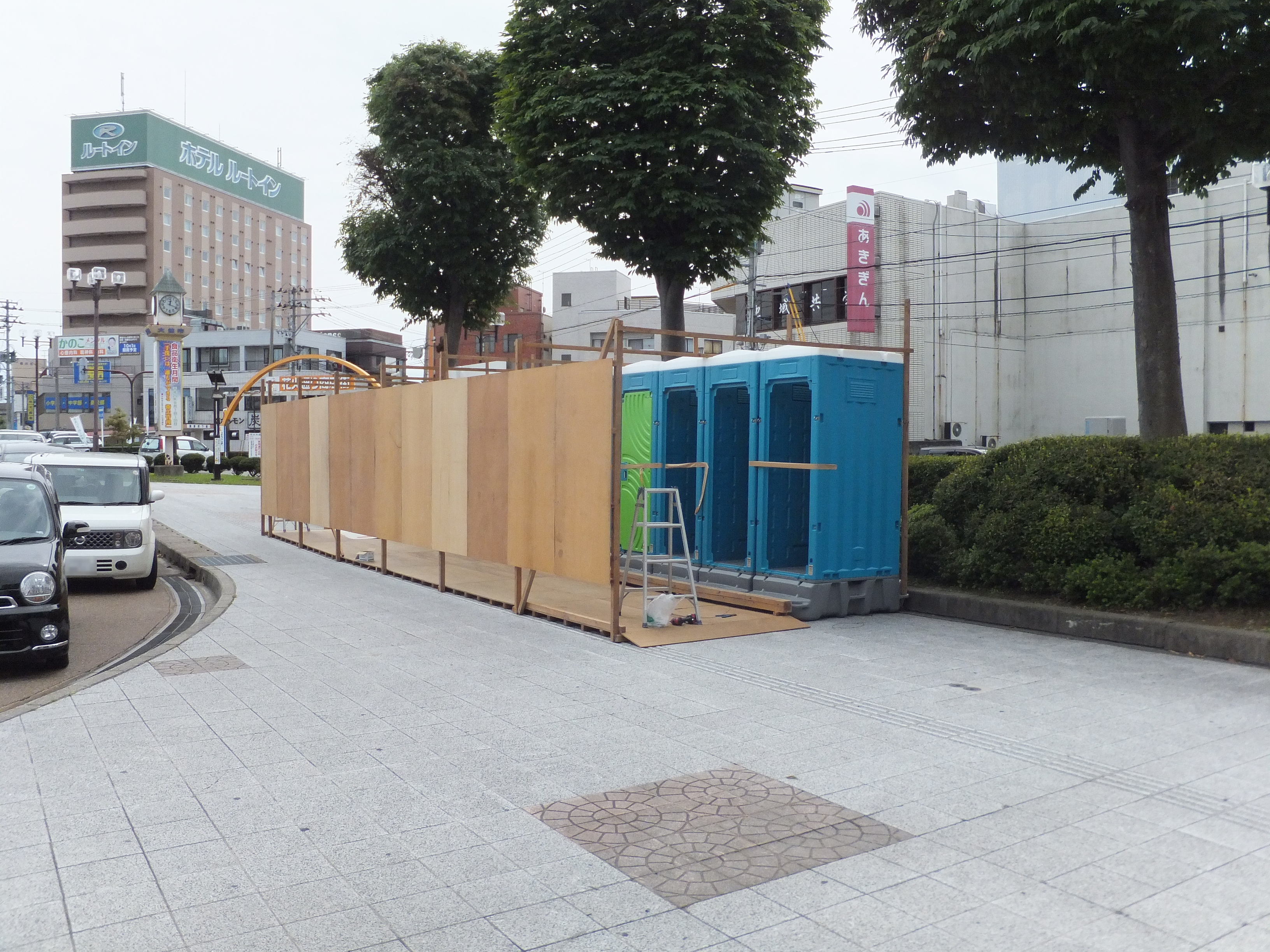 全国花火競技大会前日の大曲駅の様子。仮設トイレが設置された。